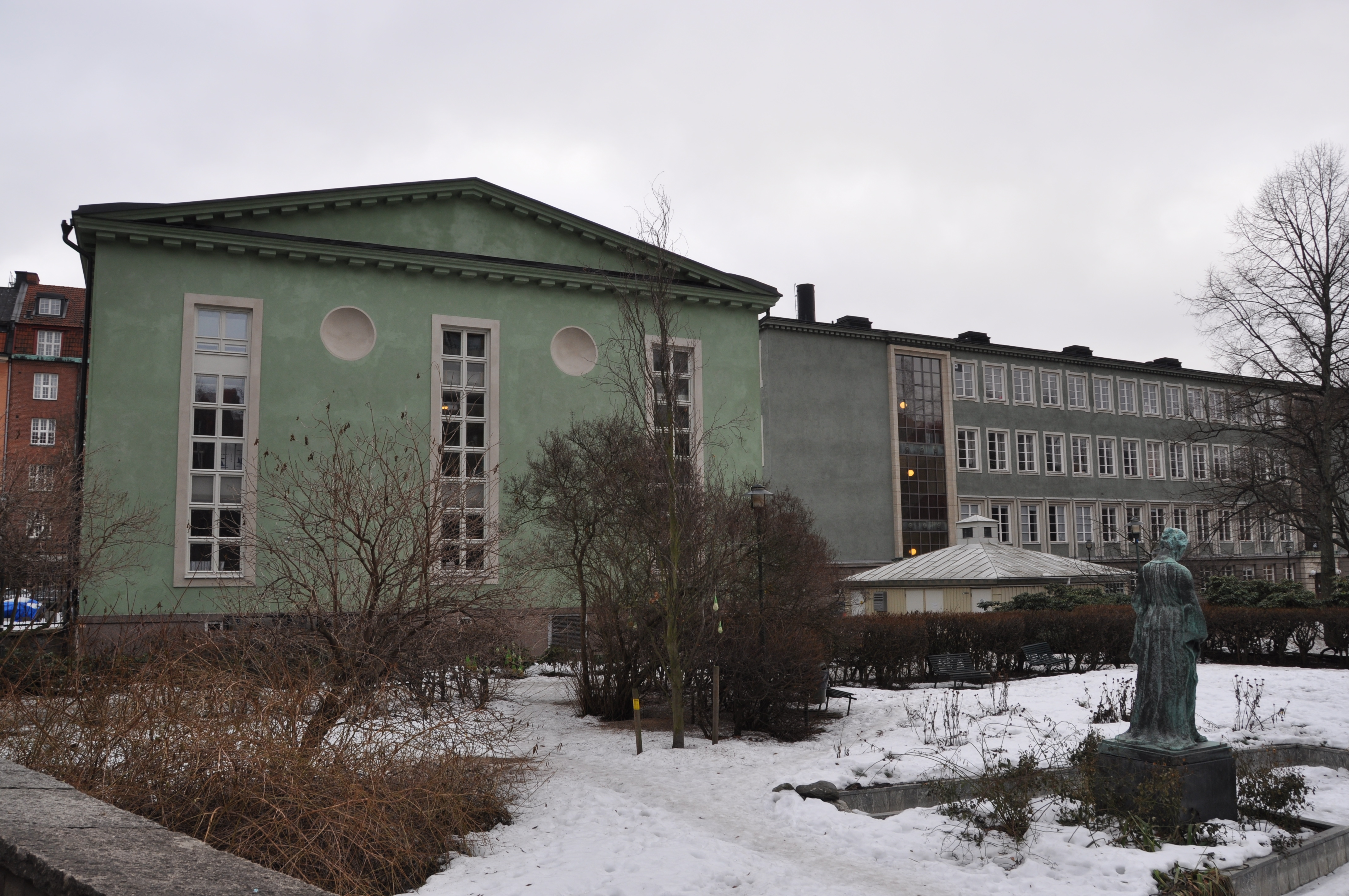 Borgarskolan, Kungstensgatan 2-8, Karlavägen 8-10, Birger Jarlsgatan 70-76. Byggnadsår 1930-32, arkitekt Knut Nordenskjöld, byggherre Stiftelsen Stockholms Borgarskola, byggmästare O Engkvist